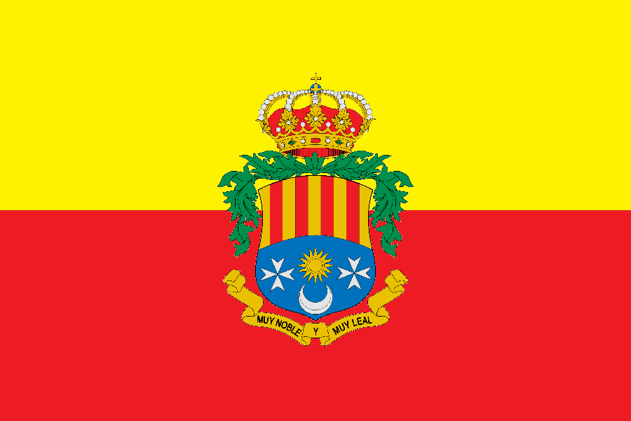 Archena Bandera